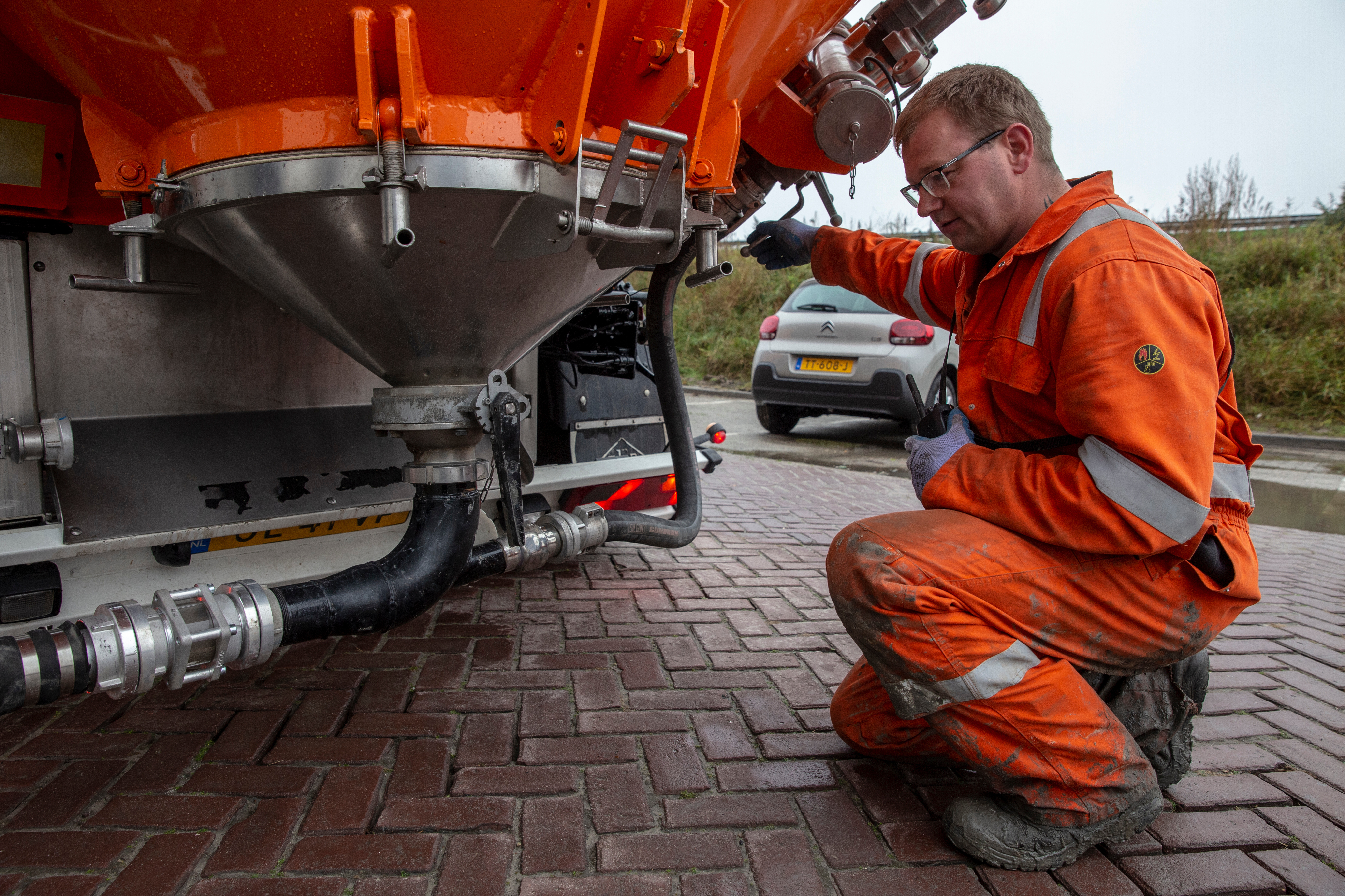 Zandblaasauto technieken